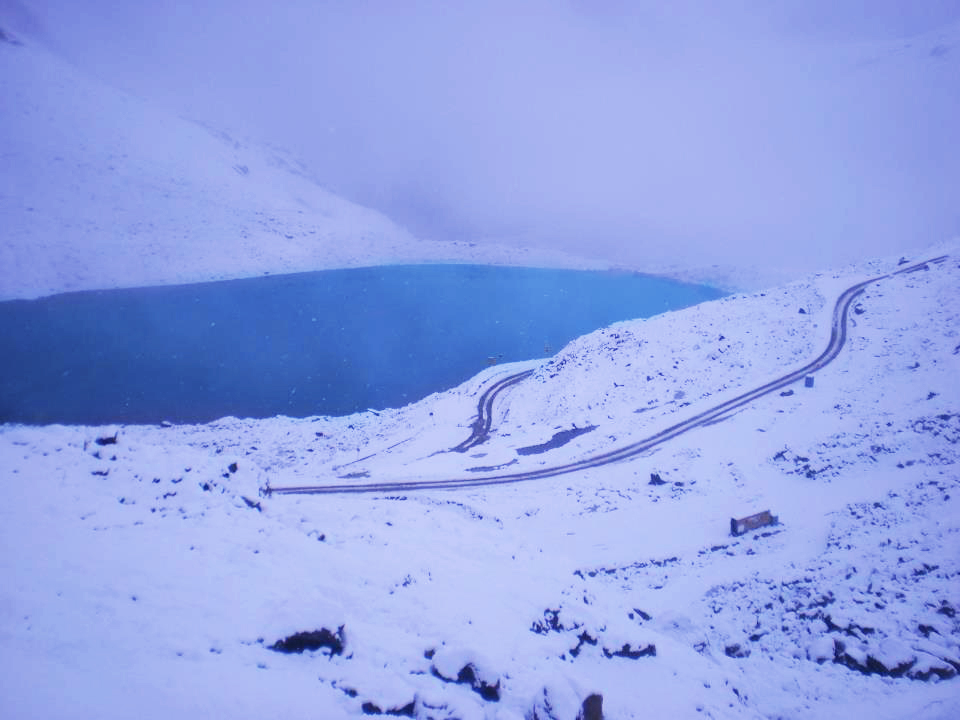 Laguna Belaúnde - Punta Olímpíca - Chacas - Ancash - Perú